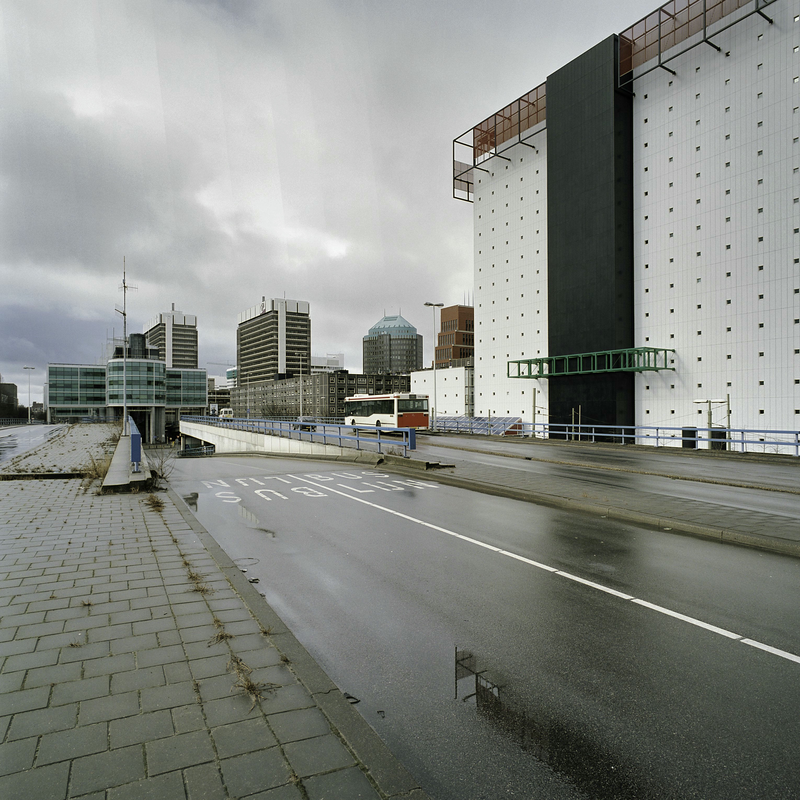 De Zwarte Madonna: Overzicht met Bernhardviaduct, situering